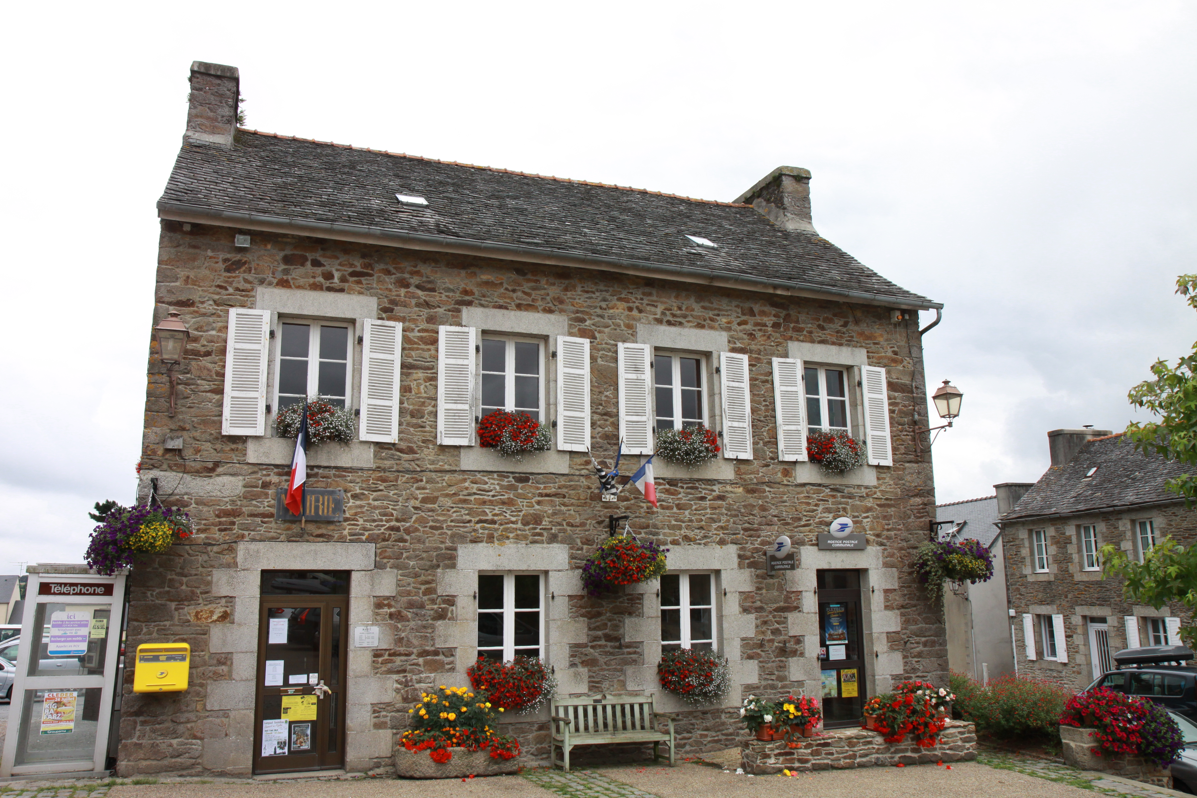 Mairie de Guimiliau au centre du village.